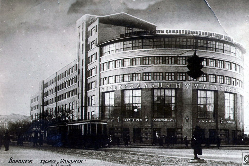 Воронеж здание Утюжок